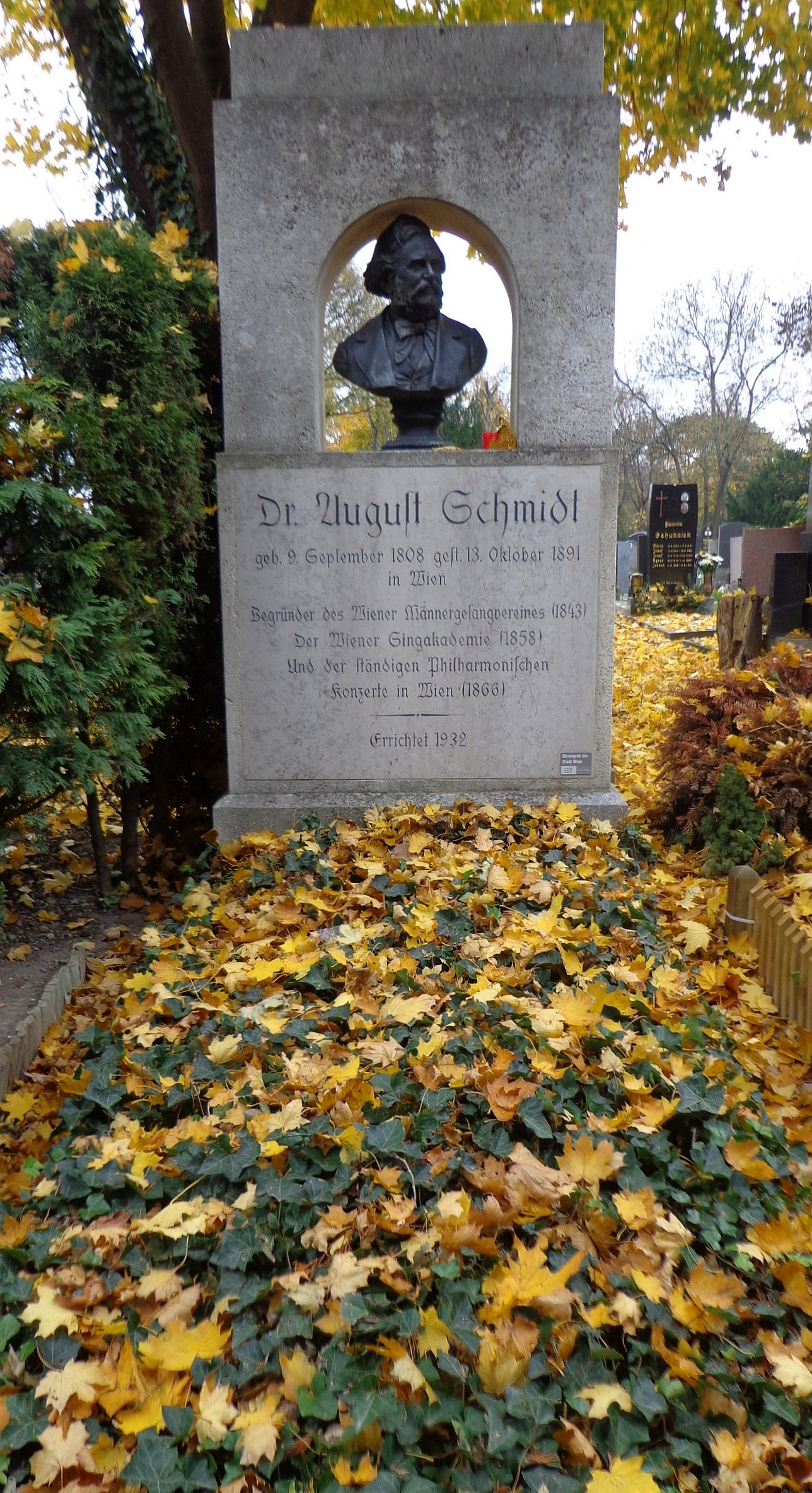 Wiener Zentralfriedhof - Ehrengrab von Dr. August Schmidt